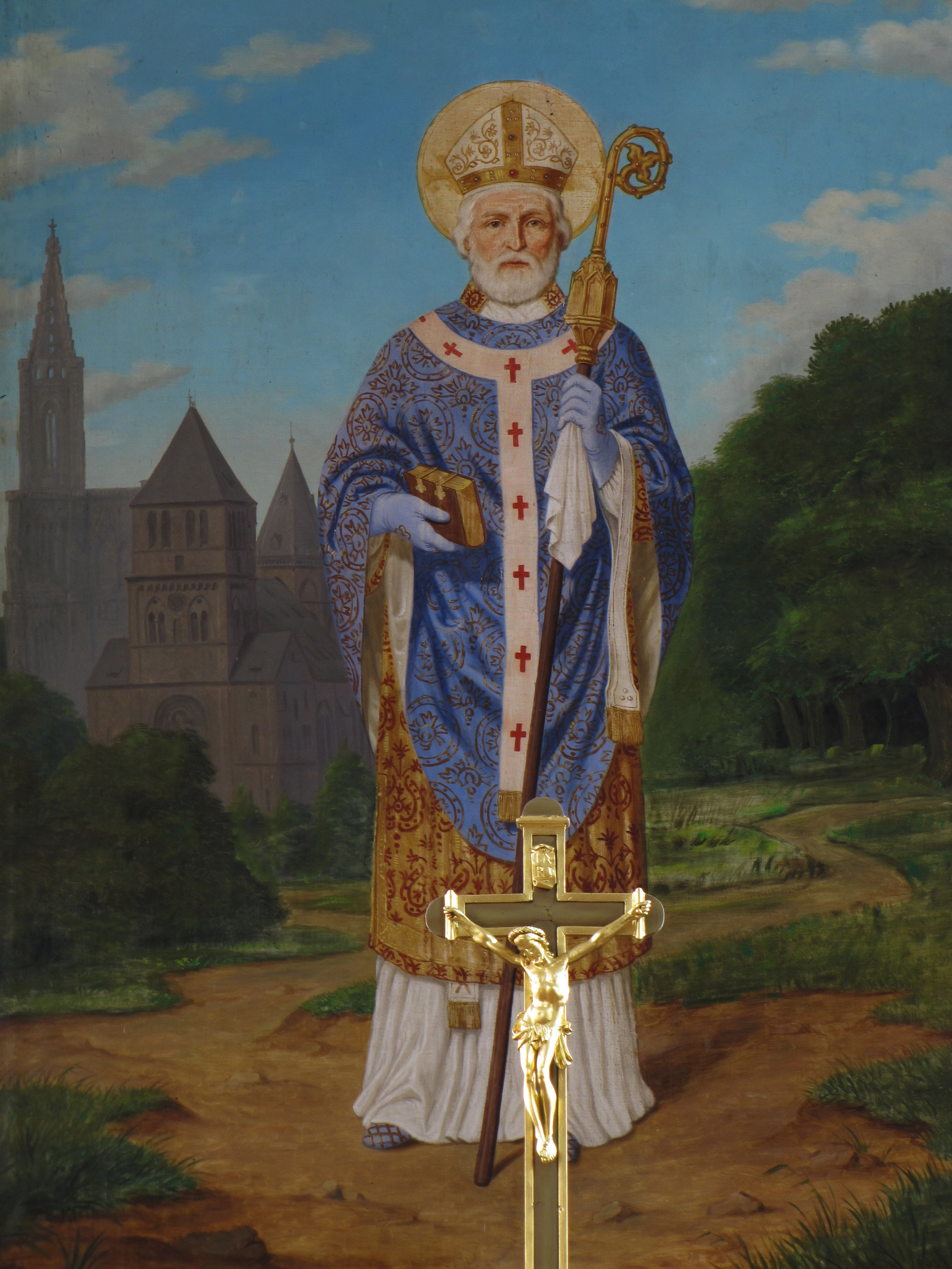 Alsace, Bas-Rhin, Duppigheim, Église Saint-Arbogast (IA00023105). Tableau du maître-autel "St-Arbogast" (Jean-Joseph KLEIN, huile sur toile, 300x210, XIXe) (Église St-Thomas et Cathédrale de Strasbourg, au 2e plan)